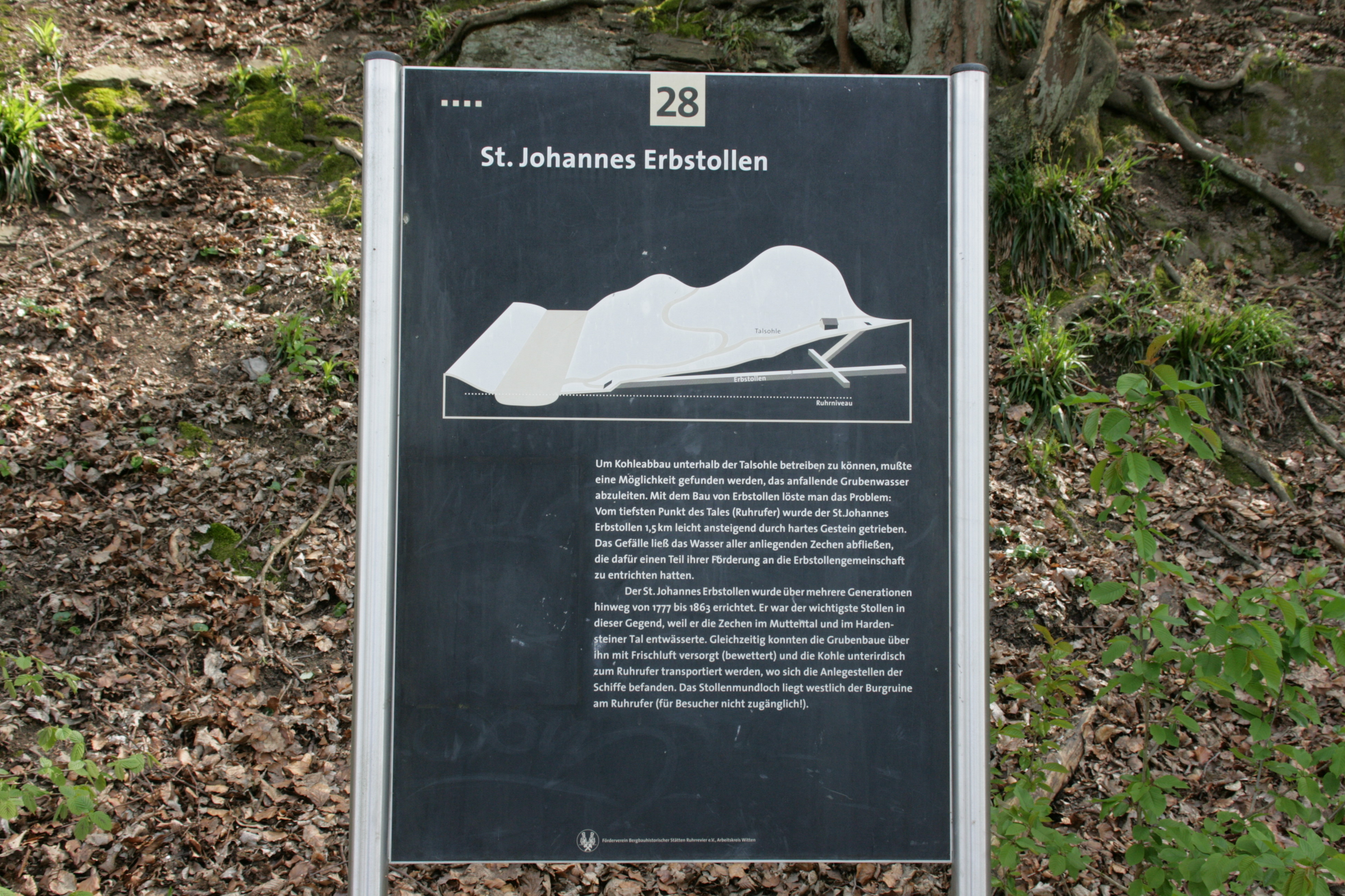 St.-Johannes-Erbstollen, Muttental in Witten